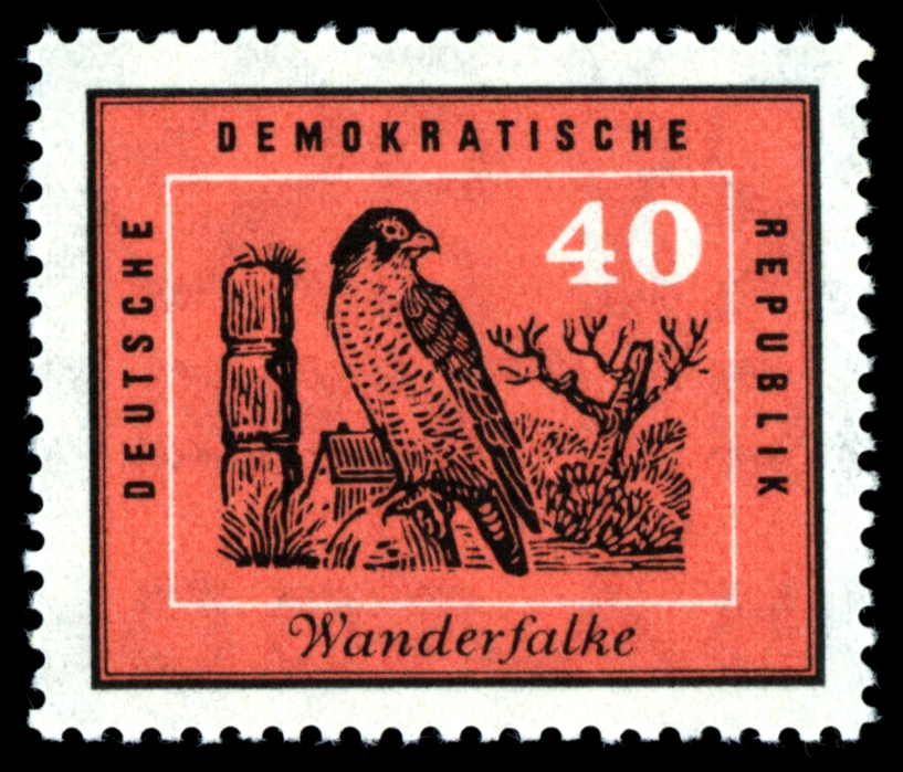 Information Information: Ausgabepreis: Pfennig First Day of Issue / Erstausgabetag: Auflage: Entwurf: Druckverfahren: Michel-Katalog-Nr: Ländercode-MiNr